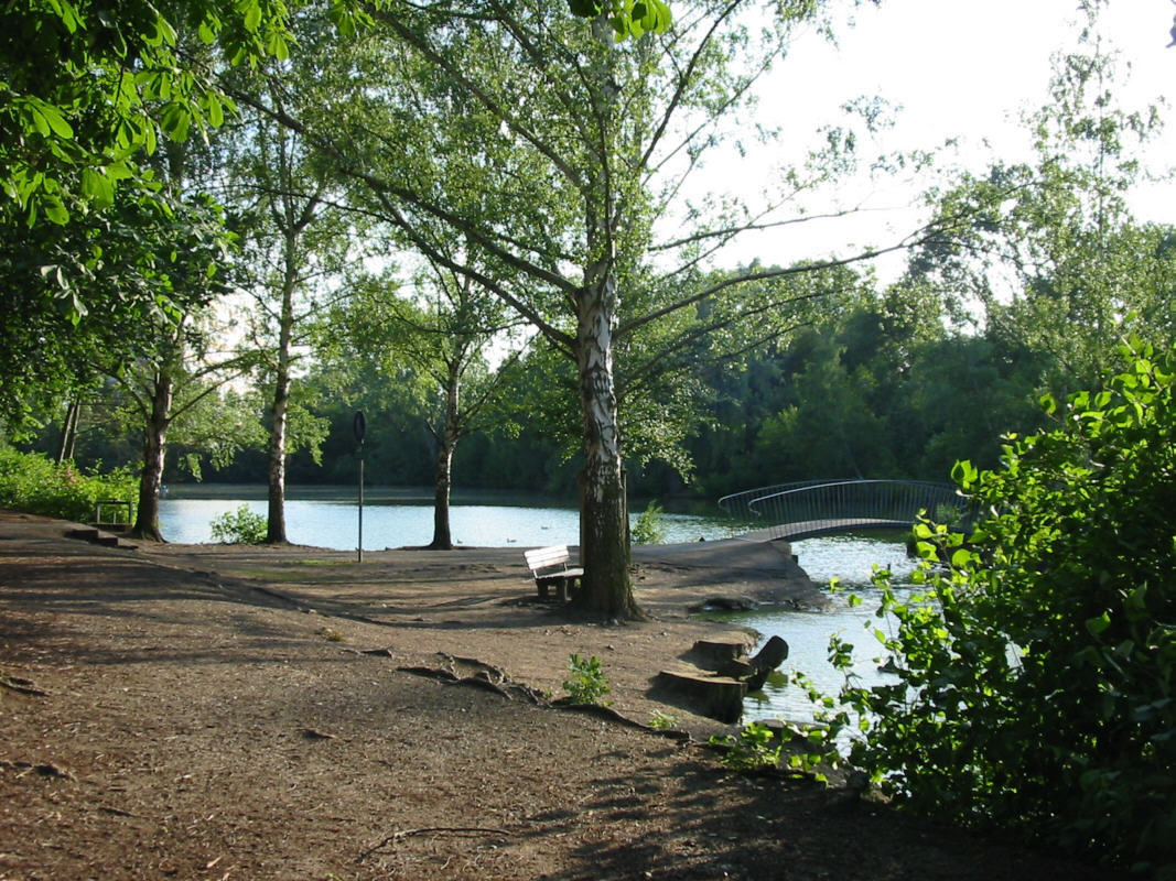 Fußgängerbrücke über den Schwanenteich (2003), Privatarchiv